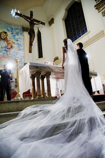 Wedding Photography